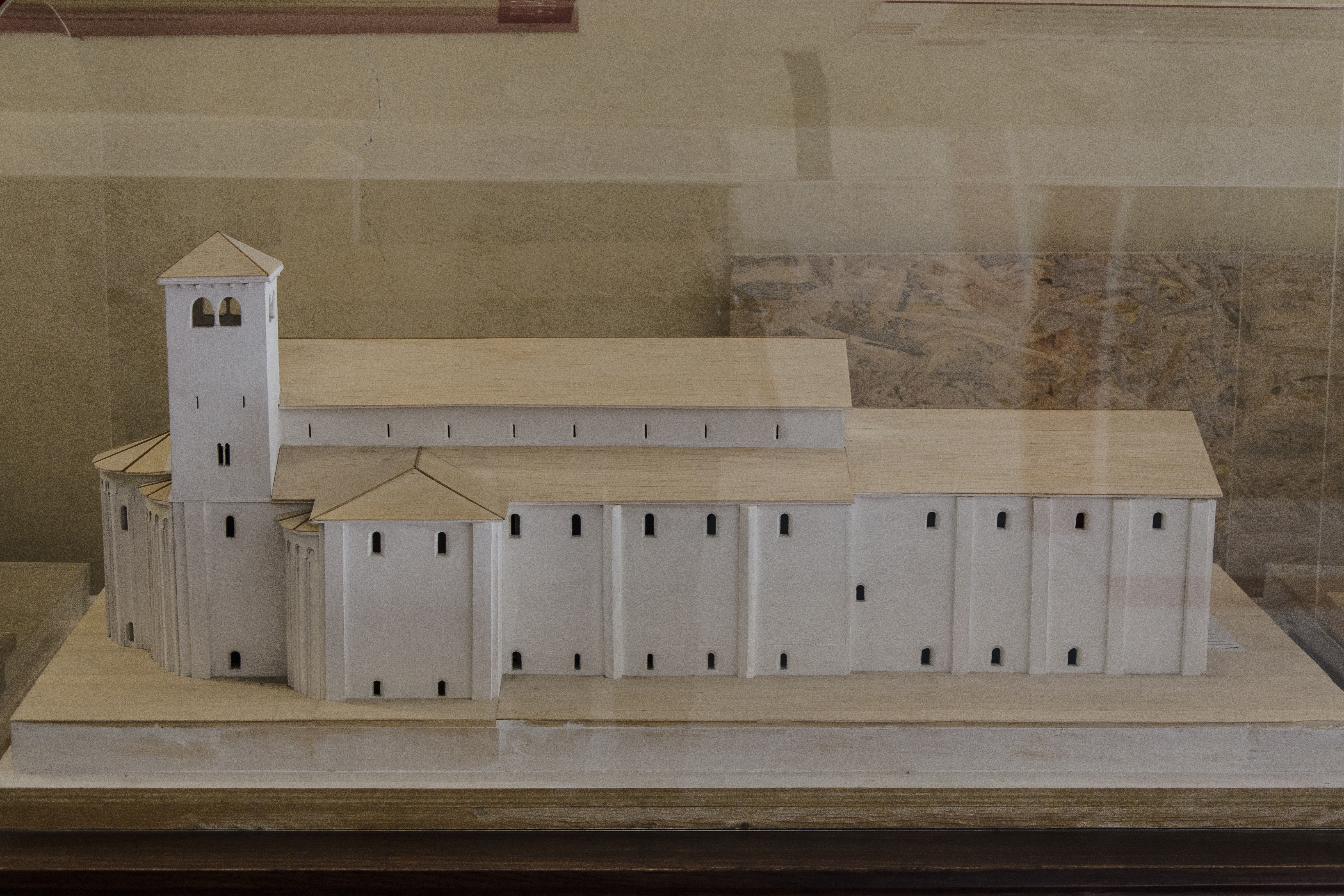 Modello della chiesa - seconda fase. Modello realizzato da Paolo Borsato